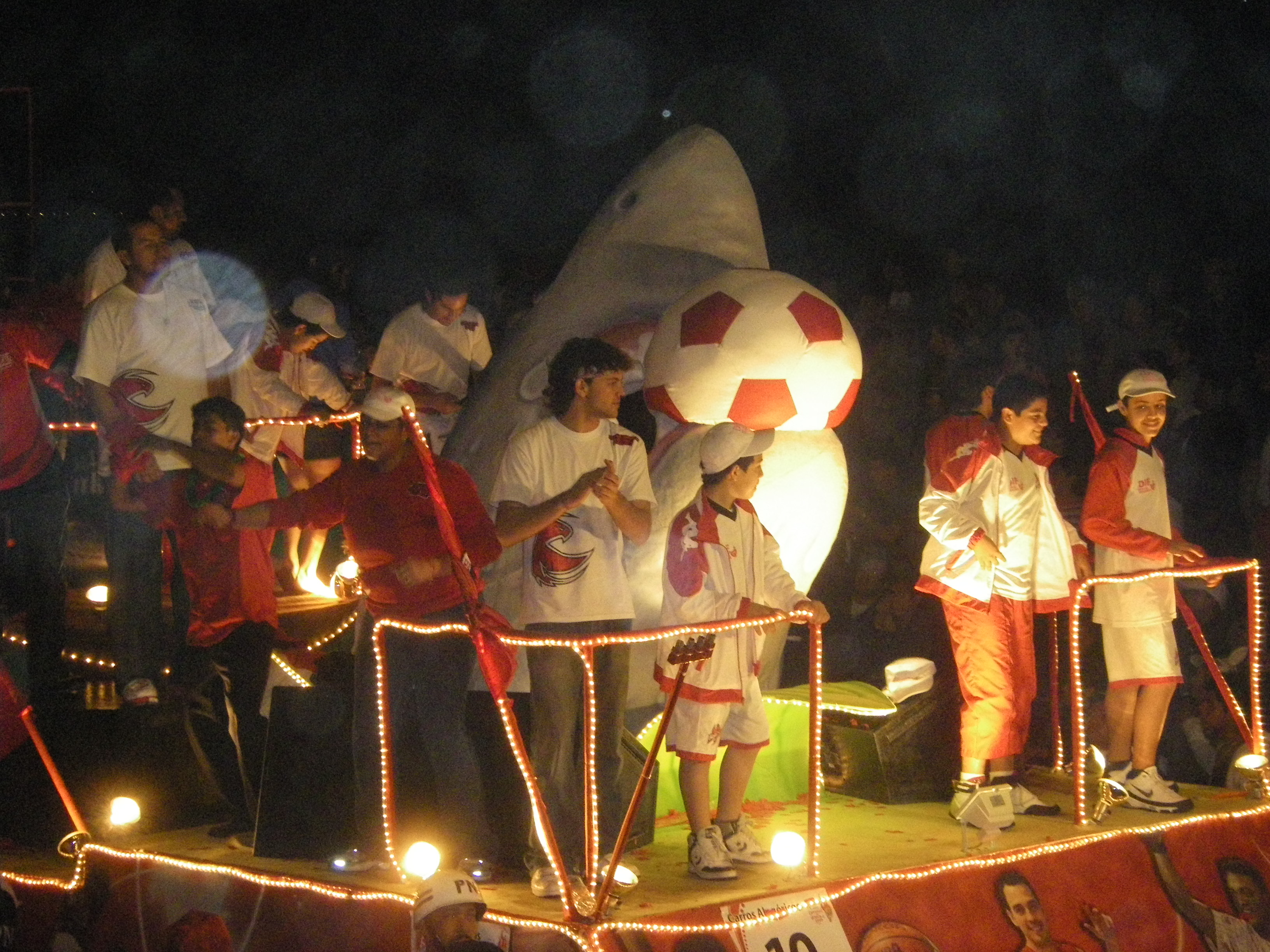 Motivwagen des CD Veracruz beim Karneval 2009 in Veracruz